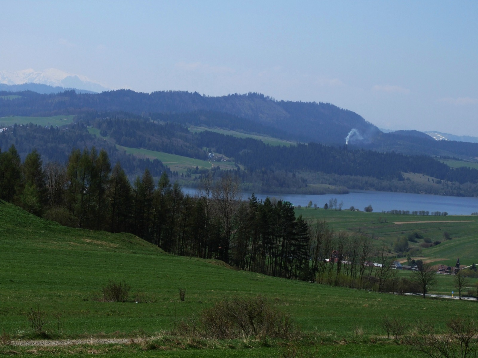 Widok na Pieniny Spiskie z południowych stoków góry Wdżar. W dole Jezioro Czorsztyńskie i Łysa Góra, wyżej pasmo Żaru i Tatry